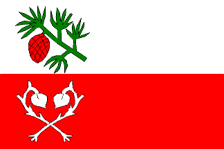 Vlajka obce Sosnová